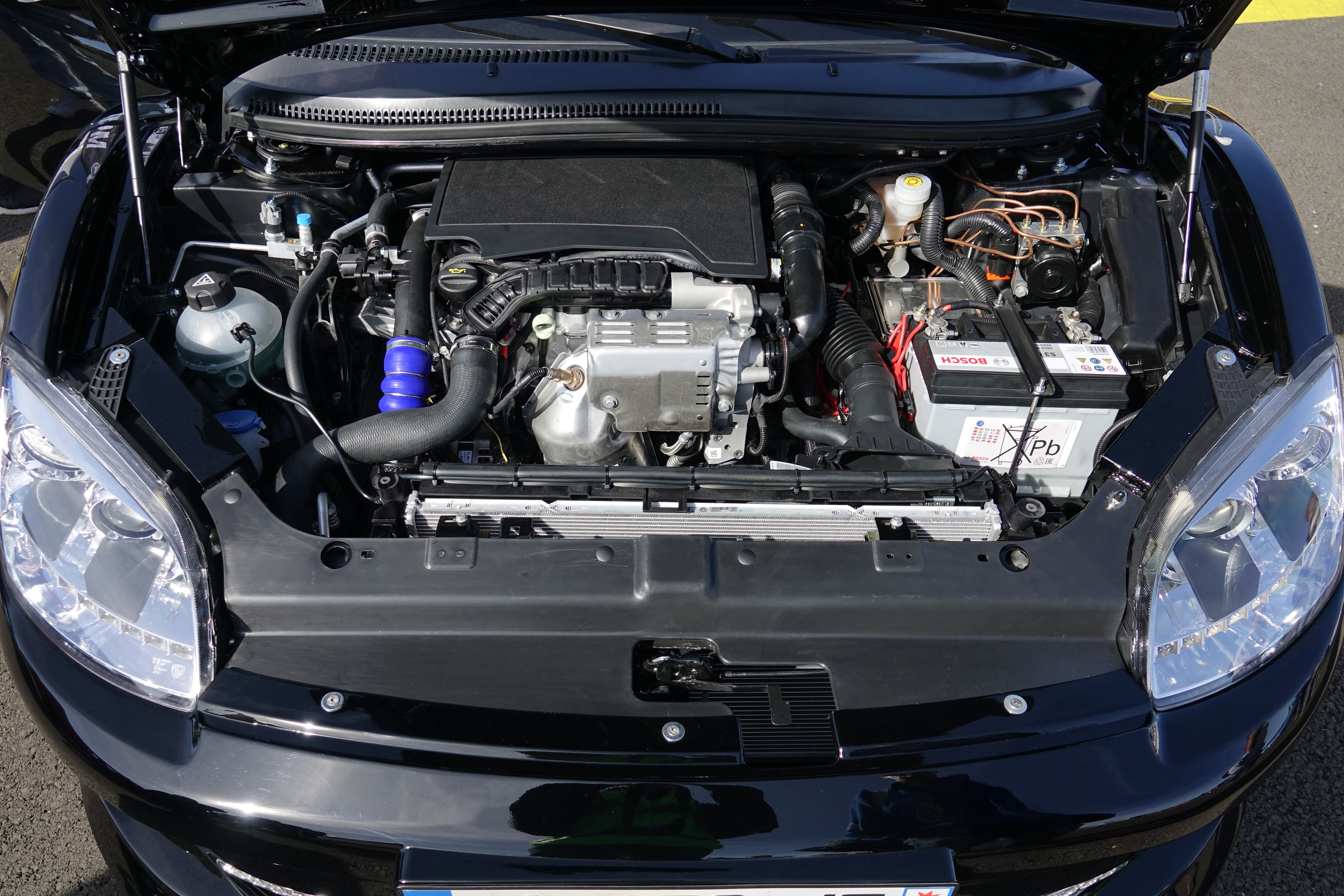 MPM Erelis aux Grandes Heures Automobiles 2018